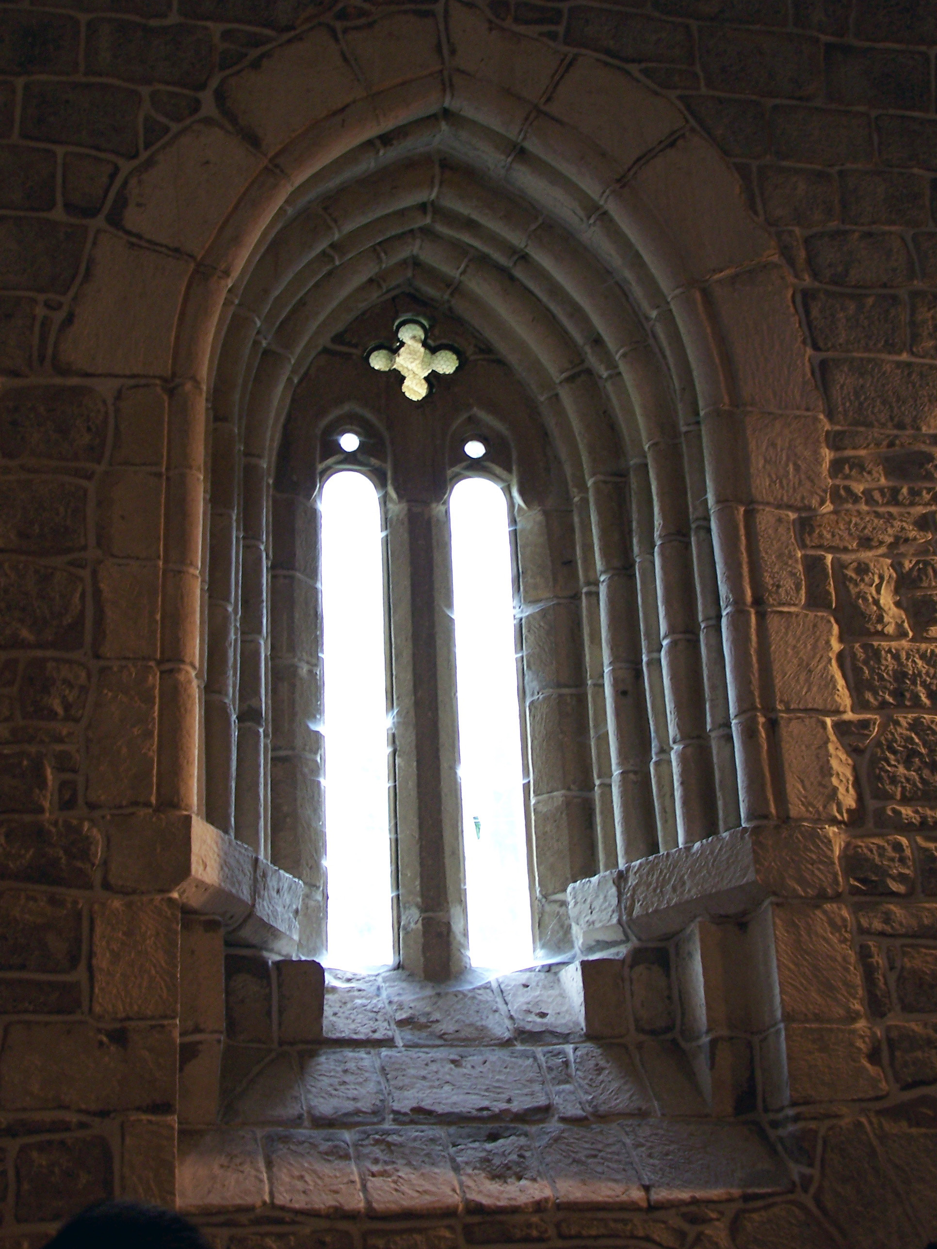 Adatseko Ama Birjinaren Kaperako lehio bat